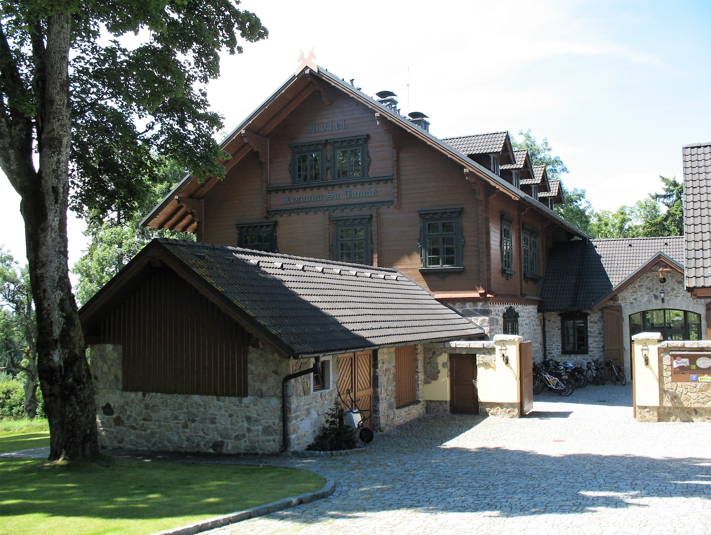 Červencová neděle ve Svatém Tomáši. Bývalá lesovna, nyní hotel